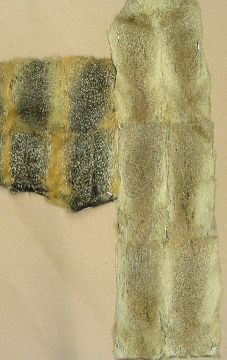 Suslik skins (ground squirrels). Suslikifelle (Ziesel), 2 Teile verschiedener Felltafeln für Pelzzwecke. In Firma Pelzmodelle Kuhn, Düsseldorf.